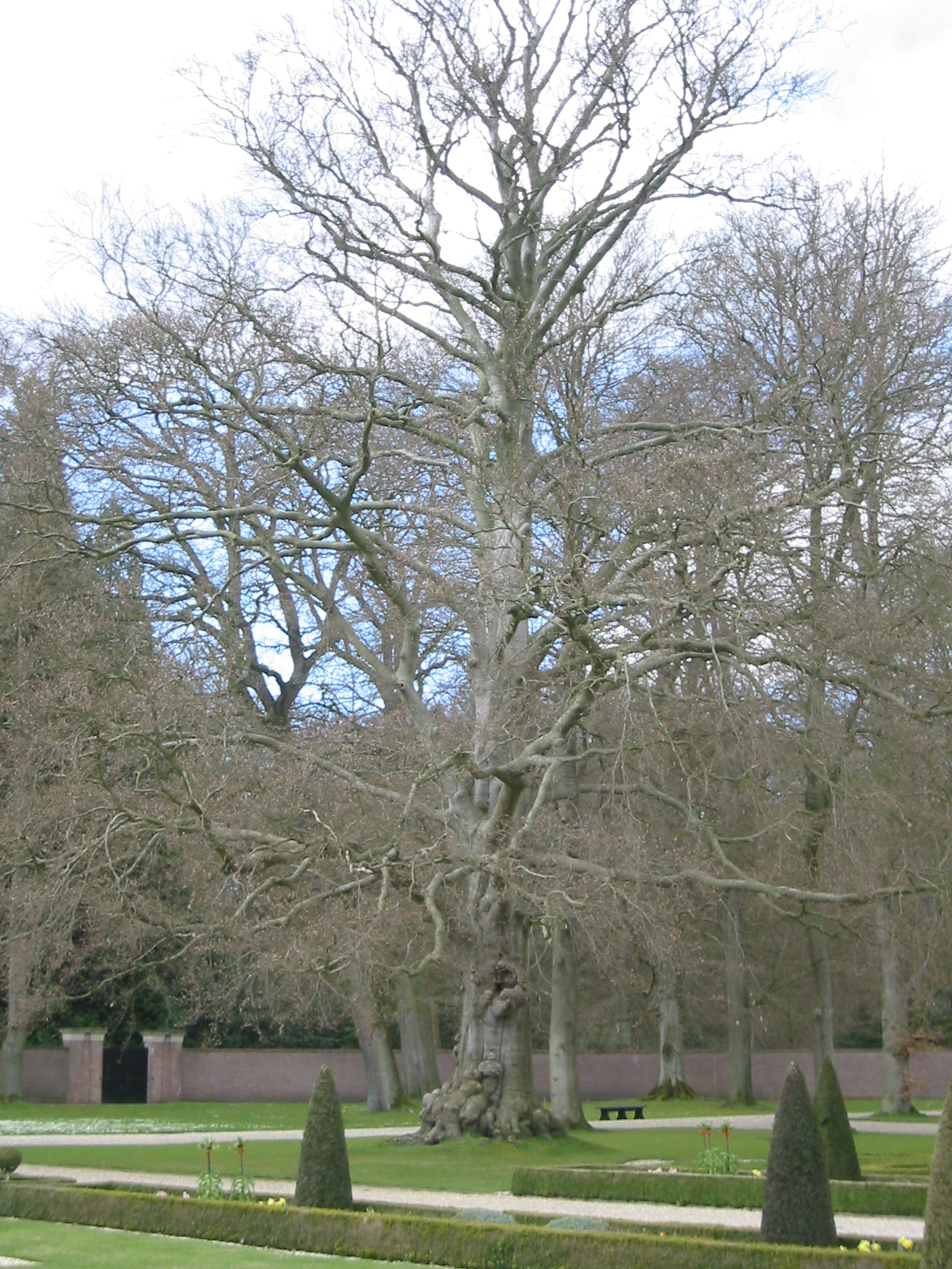 Eigen foto. GerardM 13 apr 2004 10:00 (CEST) Solitaire Beuk in de tuinen van Paleis het Loo